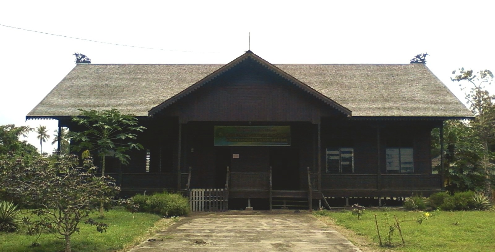 Museum Purbakala Muara Kaman, Kabupaten Kutai Kartanegara